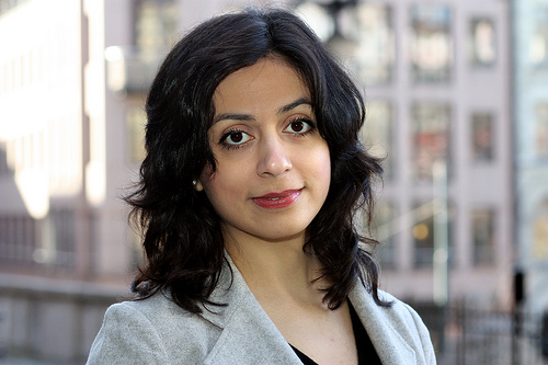 Hadia Tajik